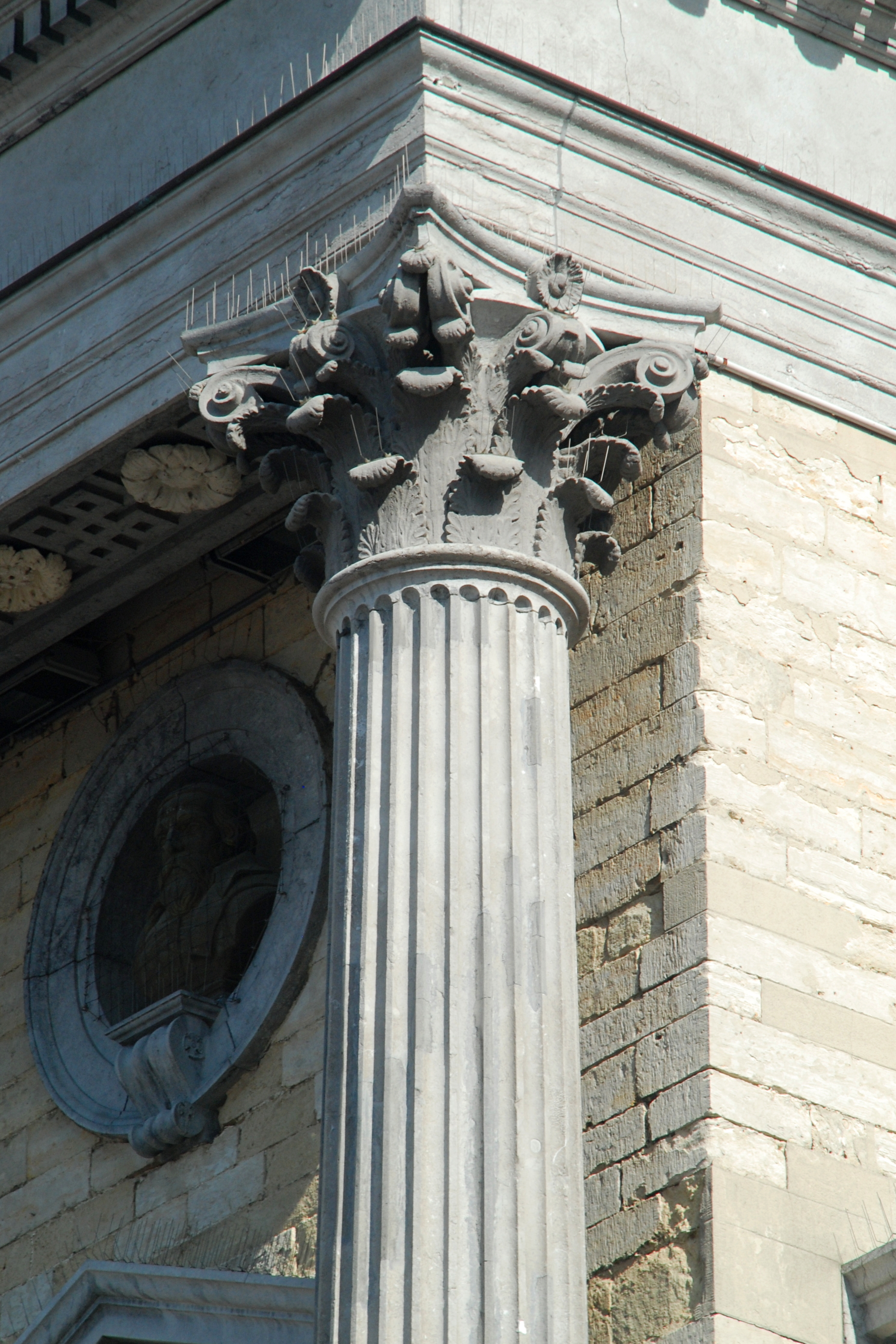 Belgique - Brabant flamand - Tirlemont (Tienen) - Hôtel de ville